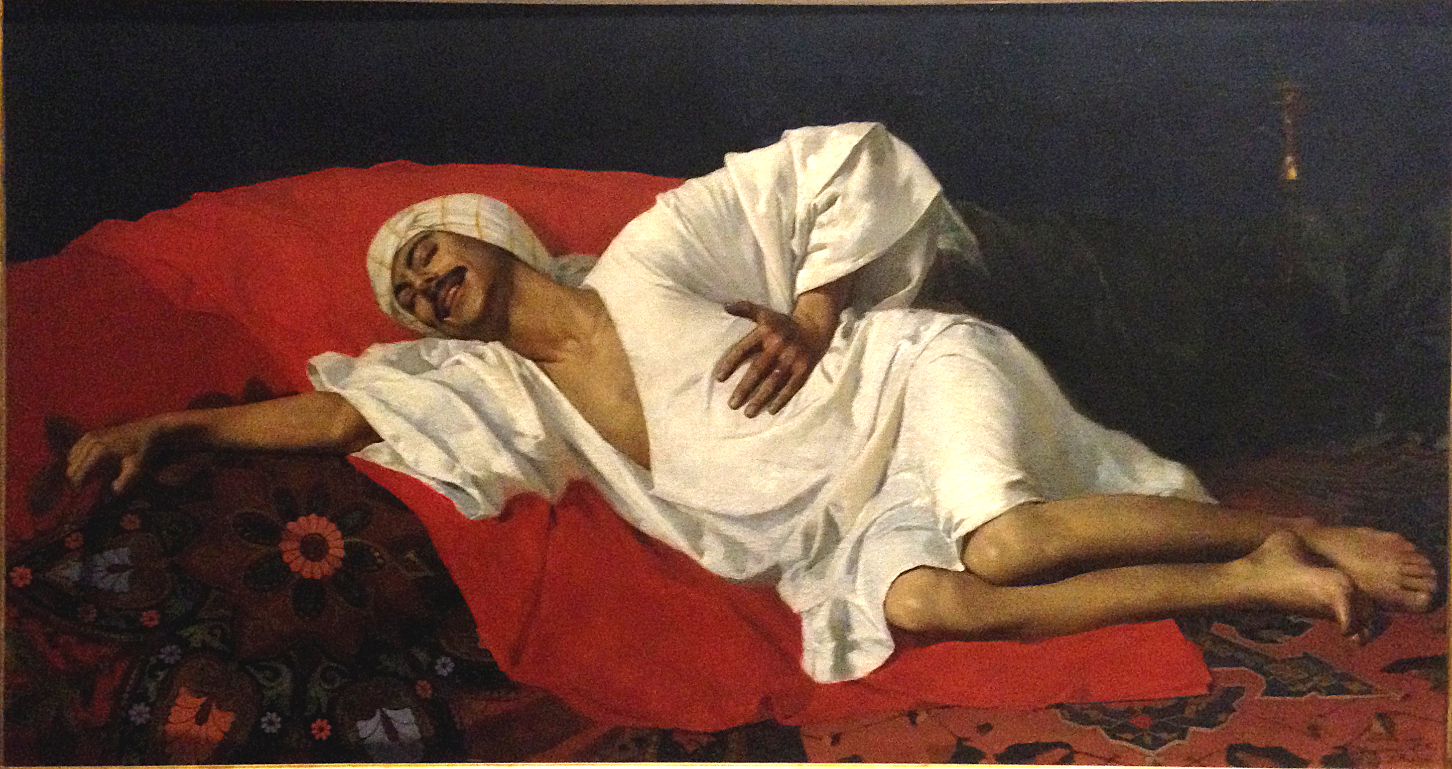 L'effetto dell'hashish - Pasquale Liotta 1875